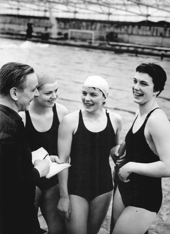 Ute Noack, Karin Taoge, Heidi Eisenschmidt Zentralbild Kohls 24.4.1962 Europameisterschaften rücken näher Vor Kurzem fand in Leipzig ein Lehrgang statt, zu dem die besten Kraulschwimmer, Rücken- und Delphinschwimmerinnen und Schwimmer eingeladen waren. Dieser Kurzlehrgang diente der Vorbereitung für die Europameisterschaften im Schwimmen, die vom 18. bis 25.8.62 in Leipzig durchgeführt werden. UBz: Hier führt der Veranwortliche Trainer Rücken- und Delphin-Schwimmer, Joachim Wanke, eine kurze Besprechung mit den Delphin-Schwimmerinnen Ute Noack, Karin Taoge und Heidi Eisenschmidt (v.r.n.l.) durch.